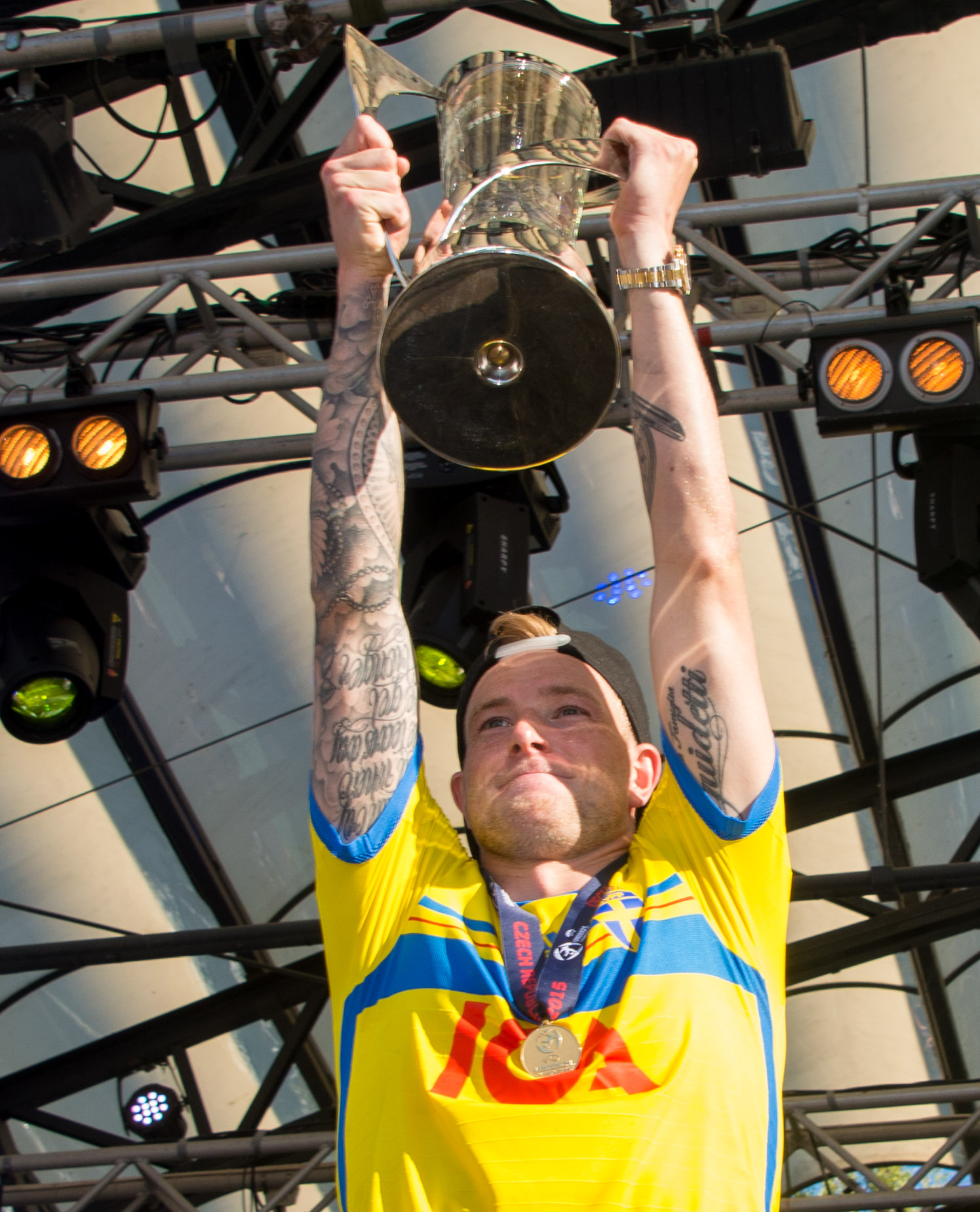 John Guidetti och Sveriges U21-landslag blir hyllade i Kungsträdgården i Stockholm den 1 juli av tusentals fans efter guldet i U21-Europamästerskapet i fotboll 2015.